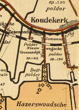 Gemenewegse polder